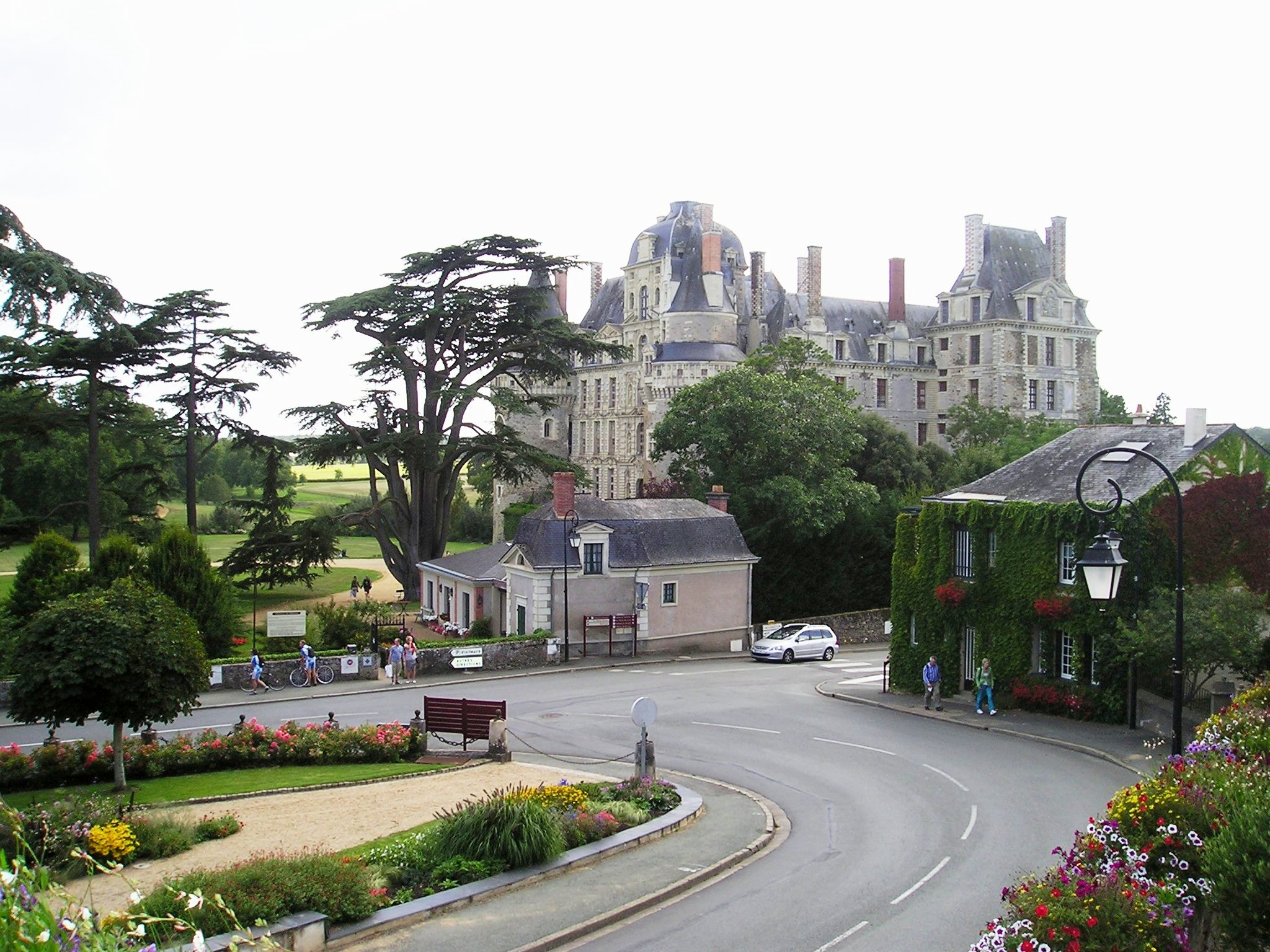 Brissac-Quince, Blick vom Ort auf das Schloss